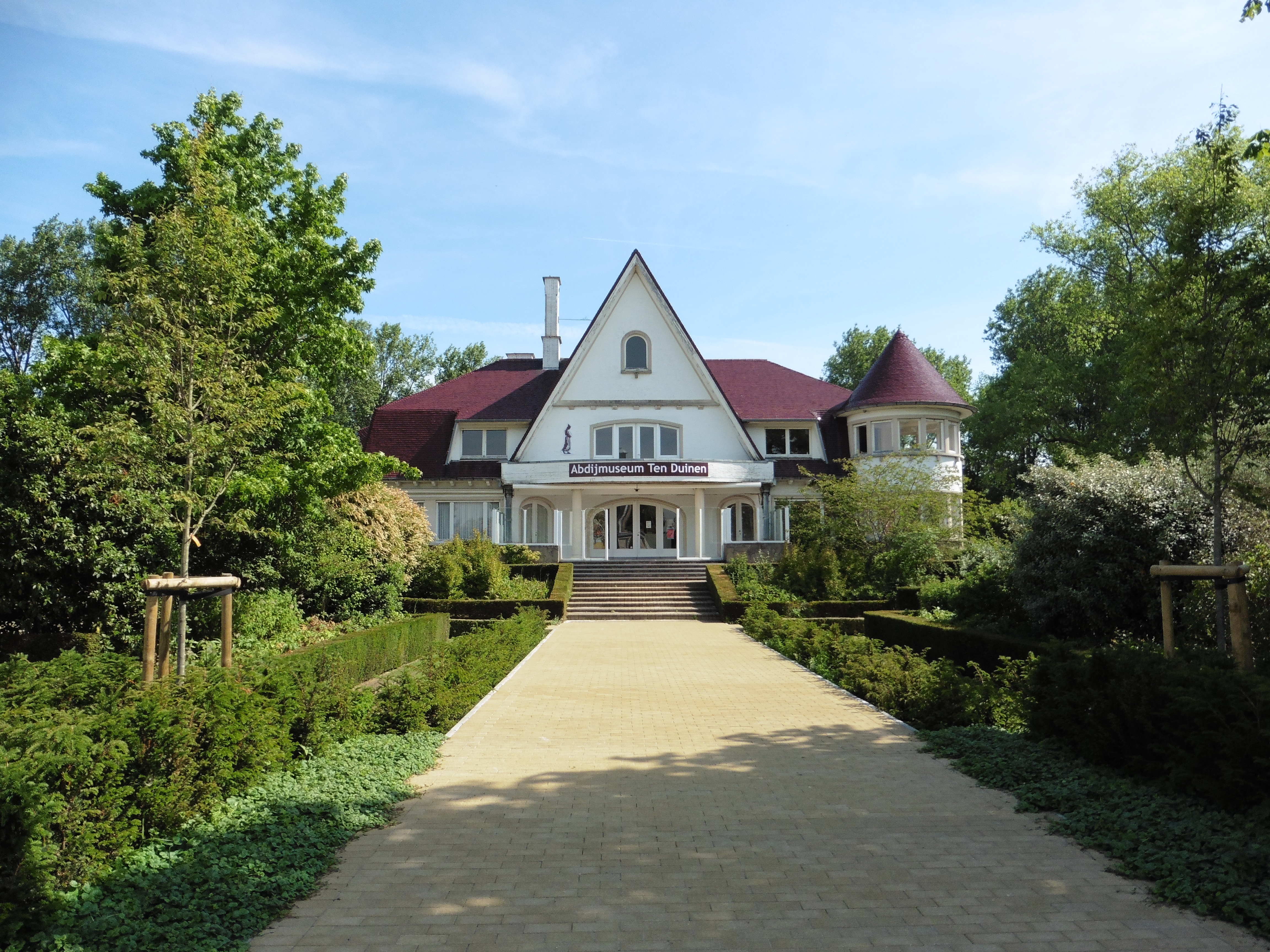 Coxyde Région flamande Belgique. Coxyde, Abdijmuseum Ten Duinen